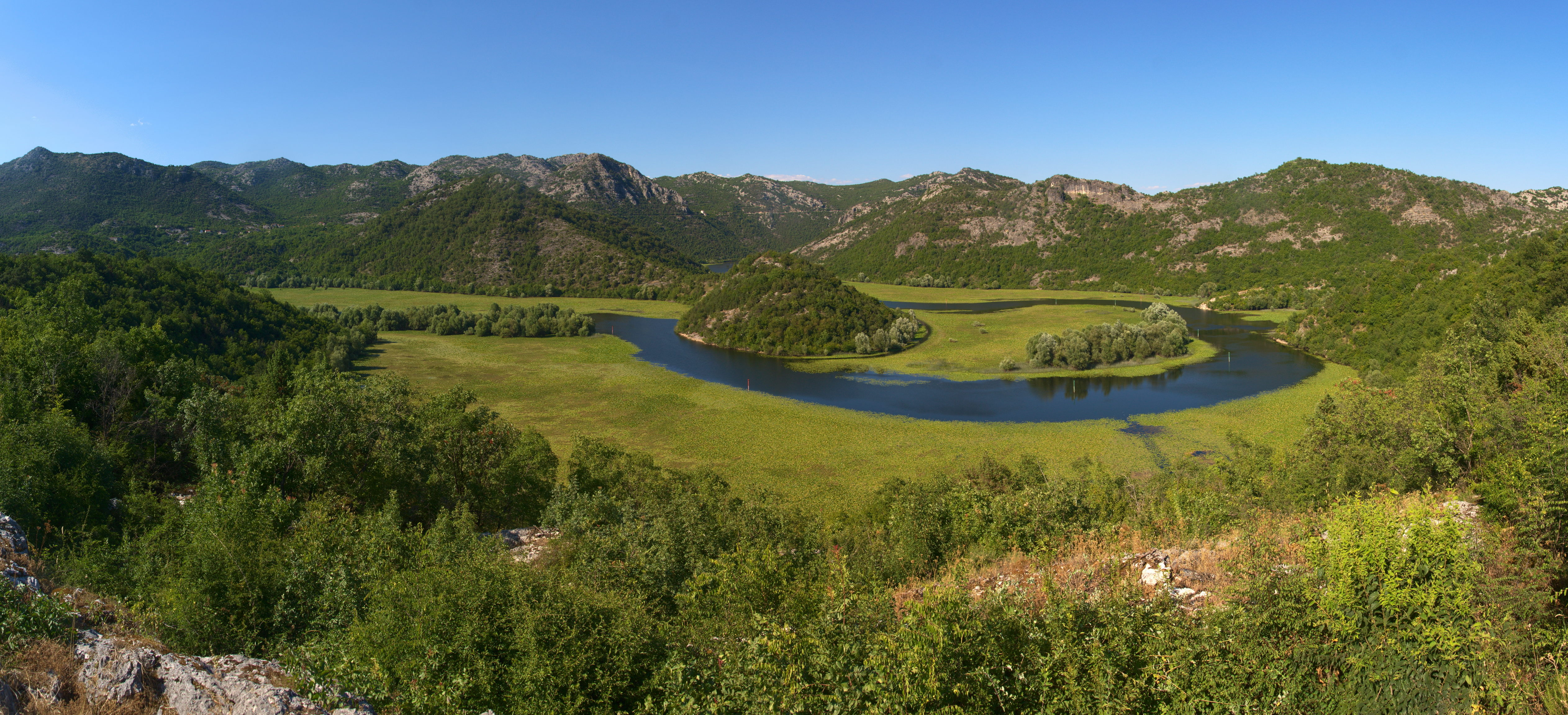 Meandro del río Crnojevića